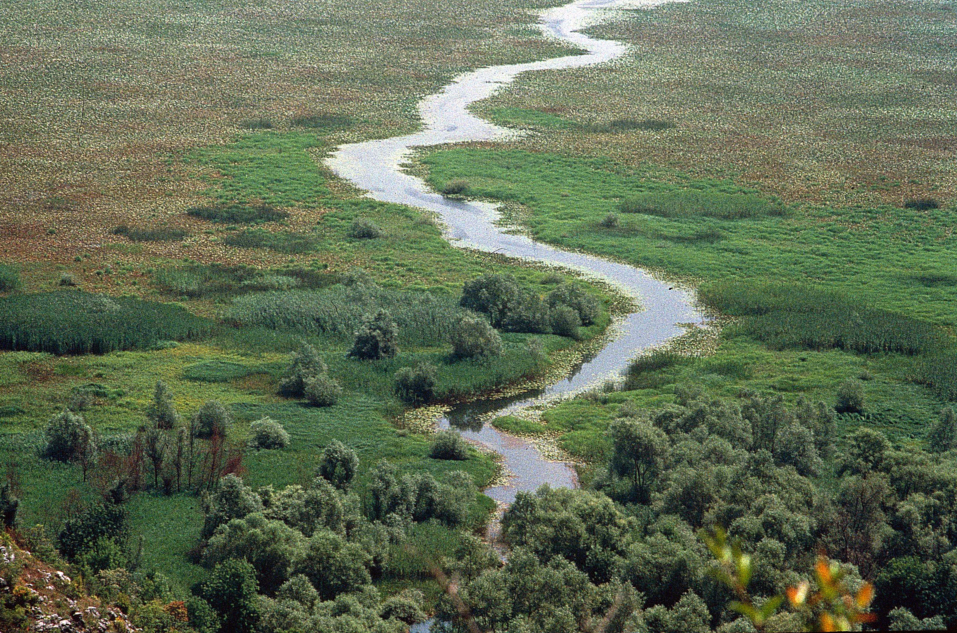 Die Moraca fließt dem Skutarisee zu